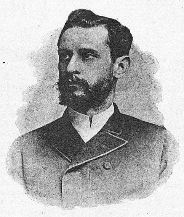 Profesor de lengua española